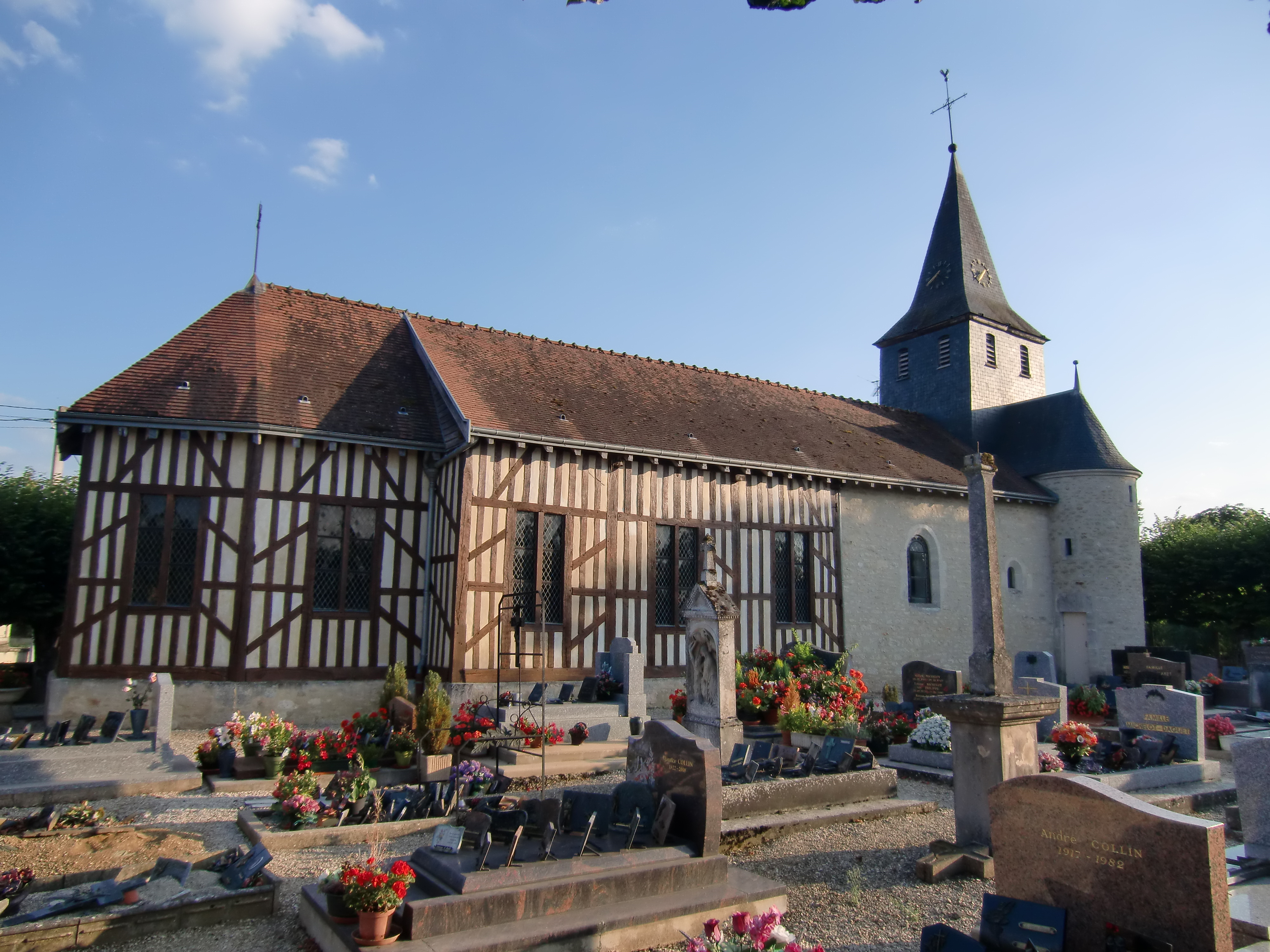 Eglise de Juzanvigny (Aube - Champagne - France) édifice à pan de bois de la région du Der